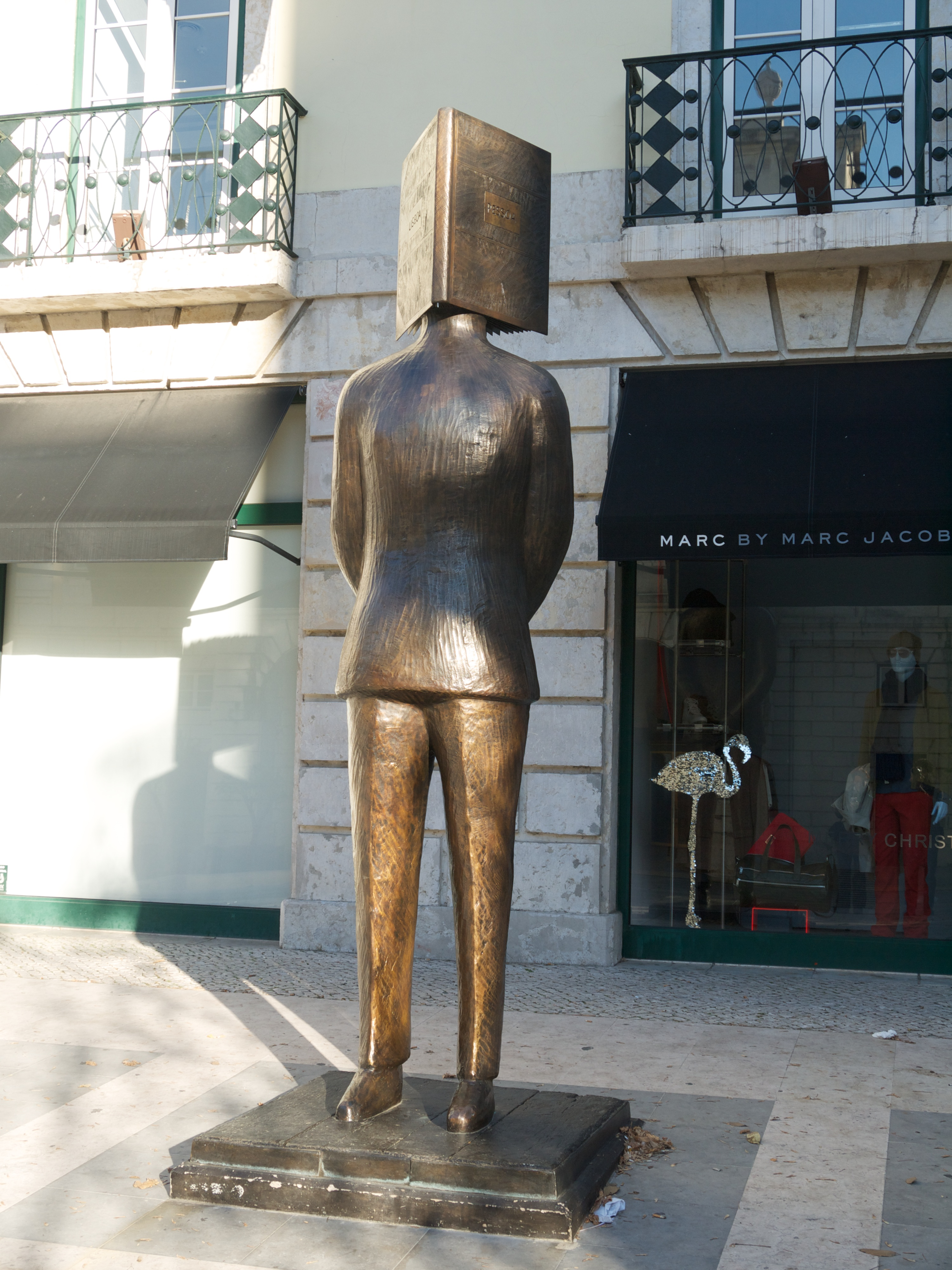 Librvizaĝa statuo